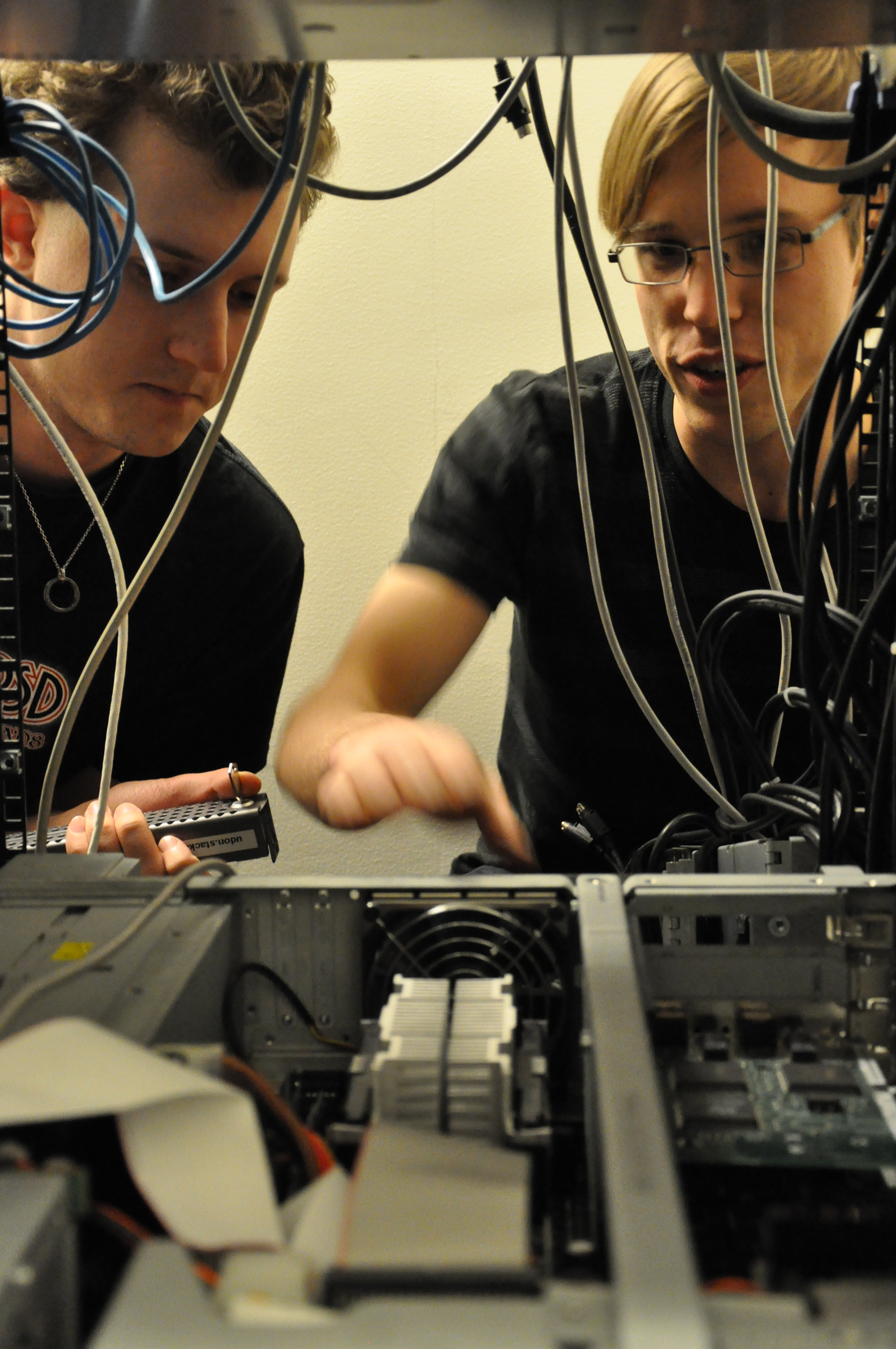 Installing servers at Stacken.